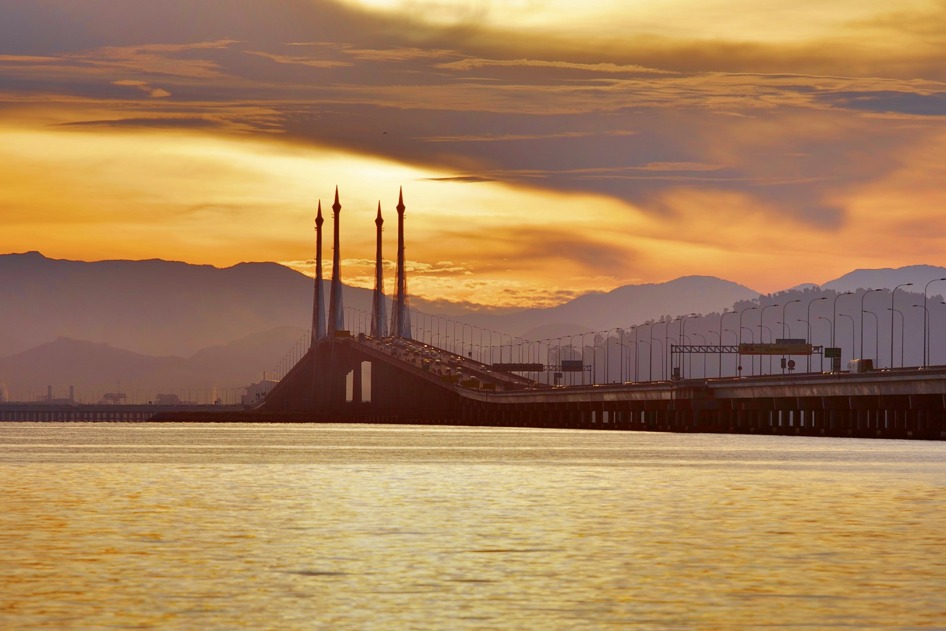 HDRtist HDR Rendering